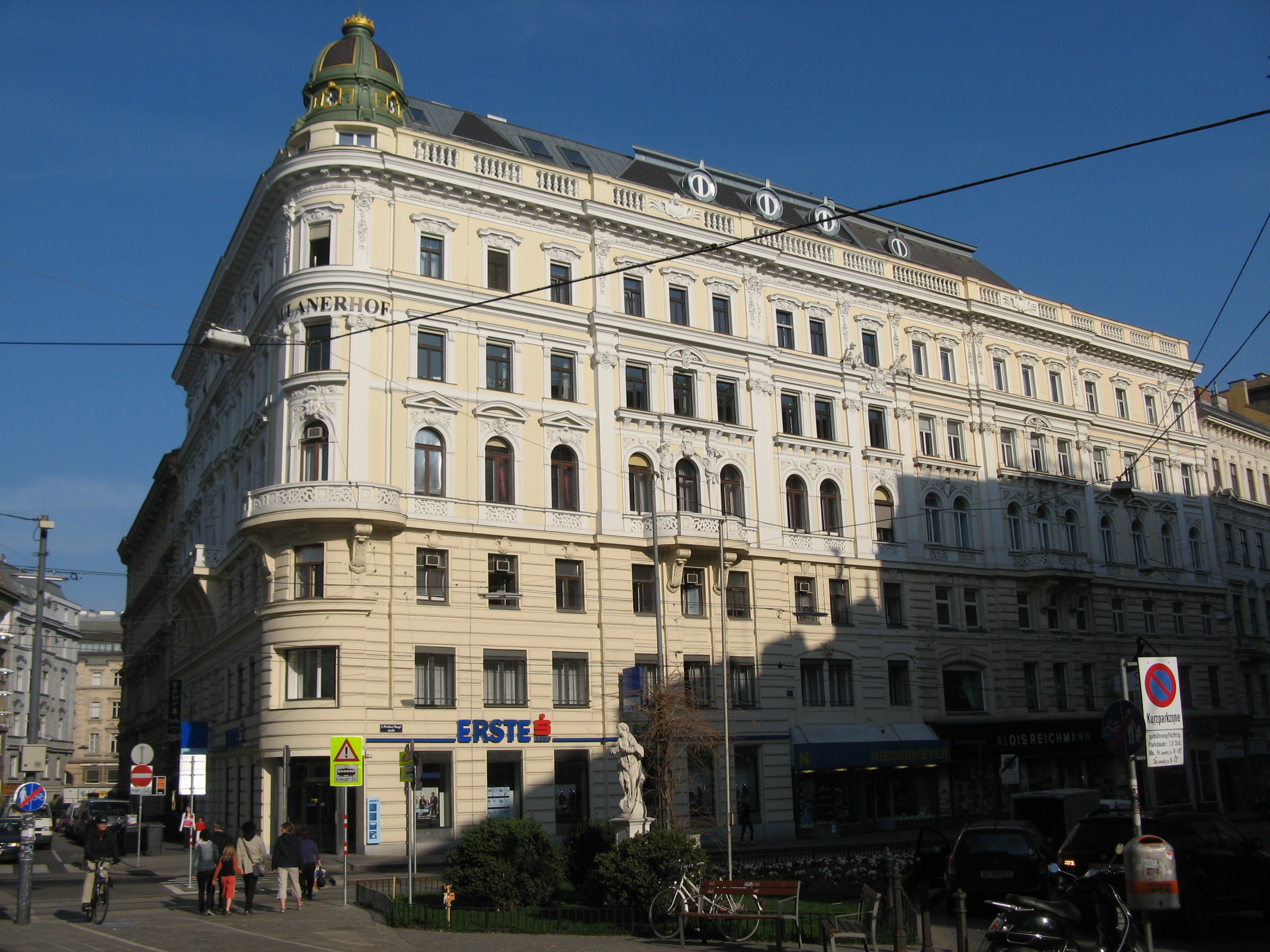 Paulanerhof (1894) von Carl Holzmann, Wiedner Hauptstraße 18-20, Wien-Wieden